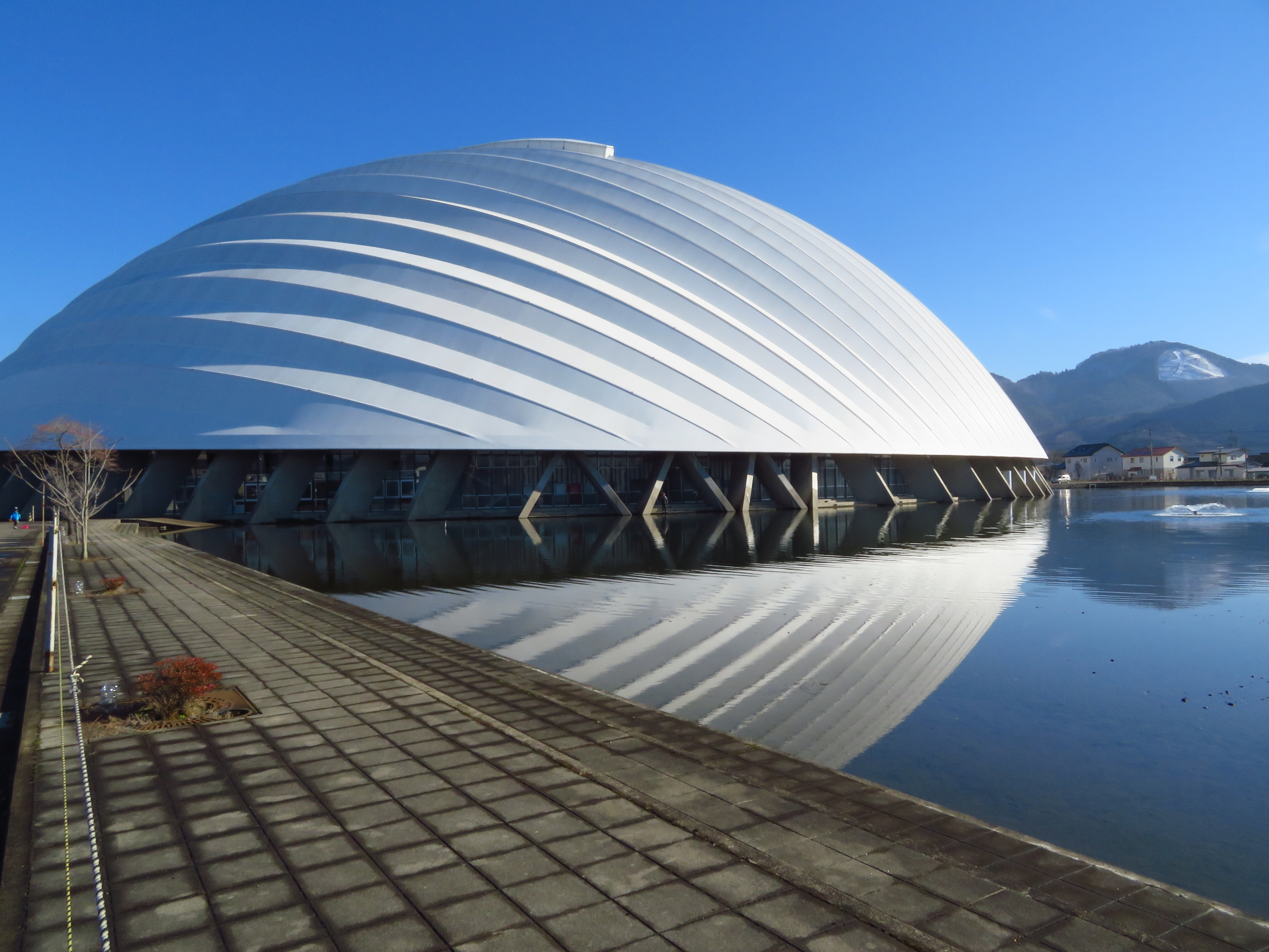 大館樹海ドーム（ニプロハチ公ドーム）：秋田県大館市 Canon PowerShot SX720 HS